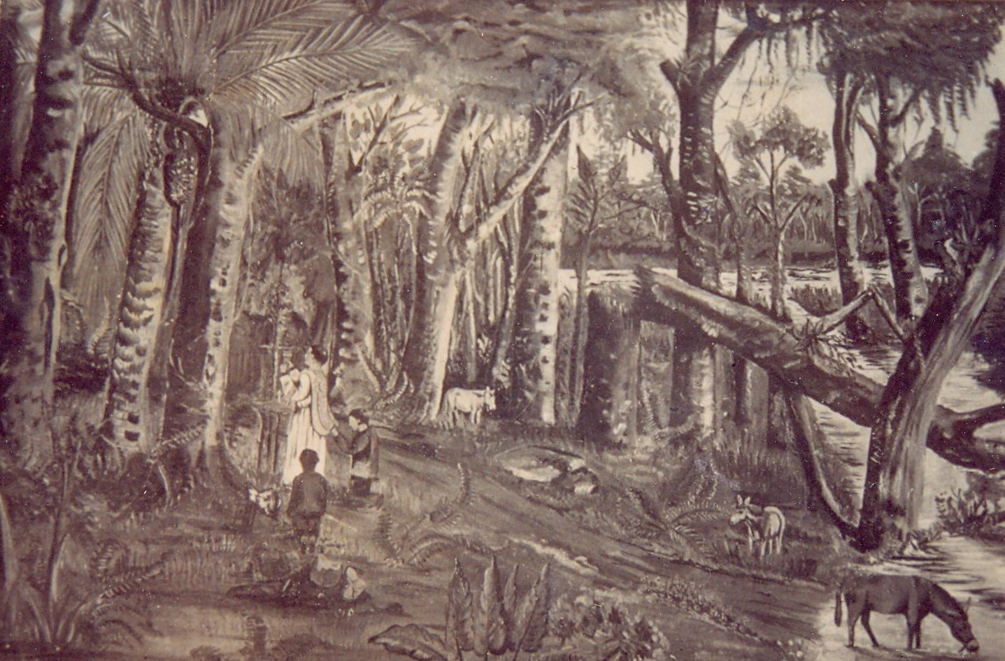 desenho da primeira missa da cidade de viçosa alagoas